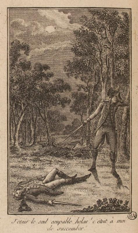 Tome 1. Première partie. Frontispice : Duel. "J'étais le seul coupable hélas! c'était à moi de succomber!"